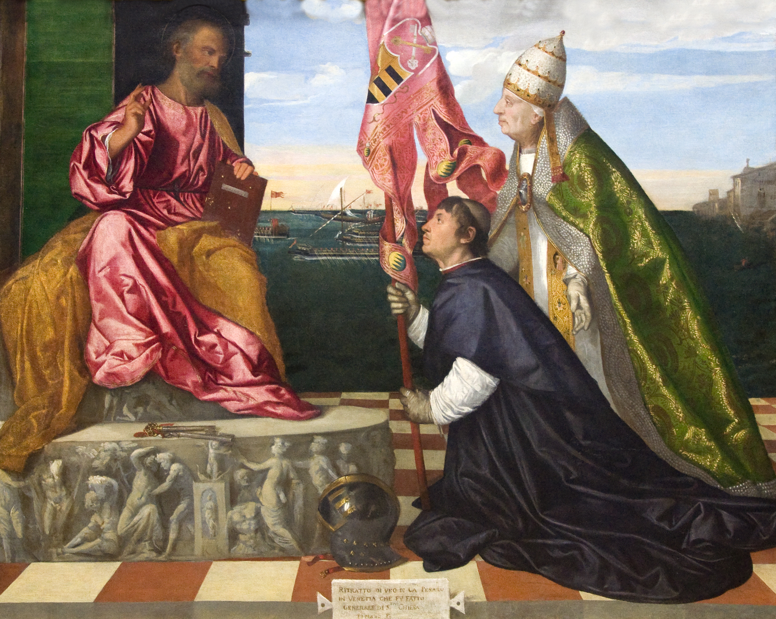 Titiaan - Jacopo Pesaro bisschop van Paphos voorgesteld door paus Alexander VI Borgia aan de heilige Petrus, in het Koninklijk Museum voor Schone Kunsten Antwerpen